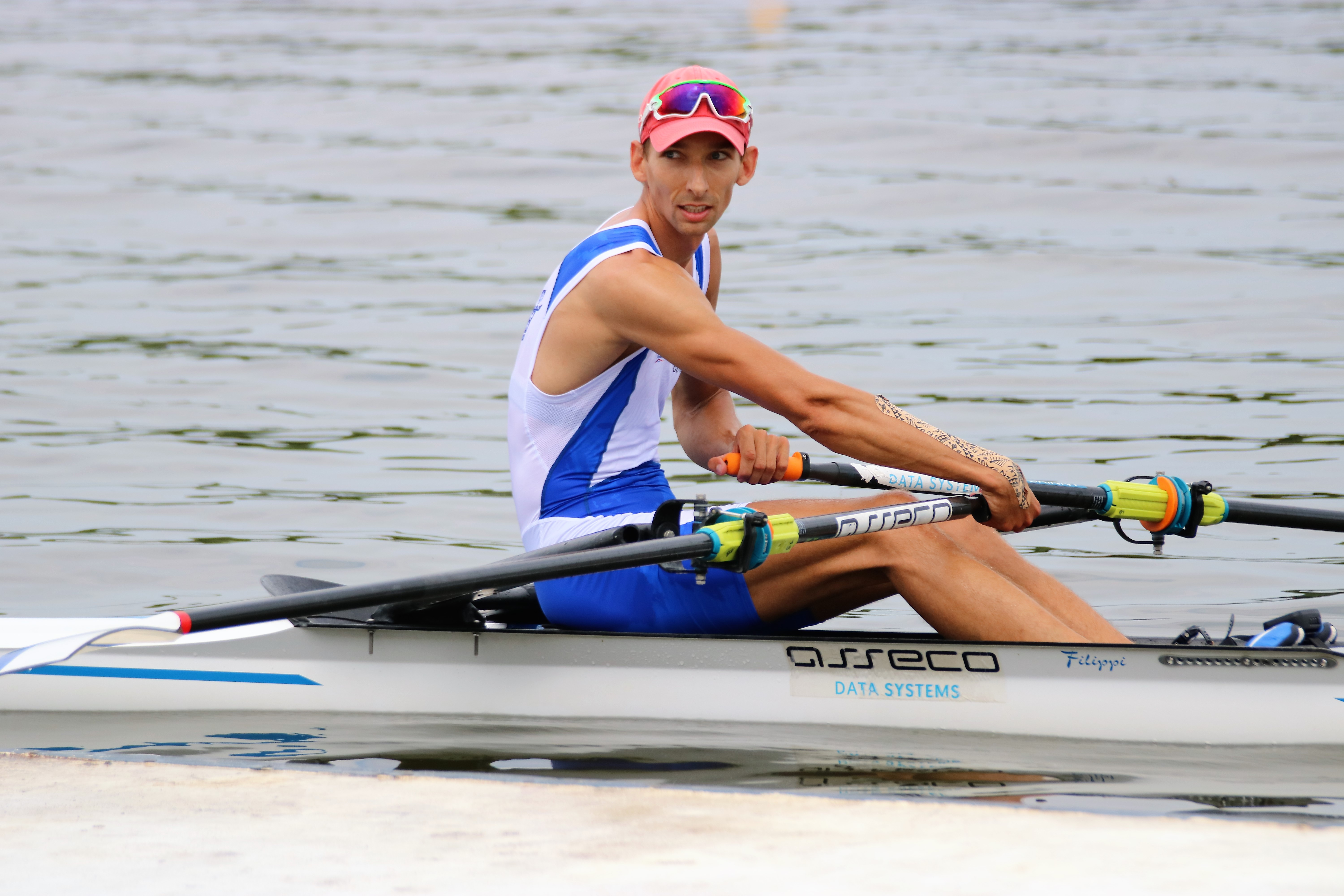 Mistrzostwa Polski Seniorów, Poznań (10.06.2018) srebrny medalista biegu 1xML - osada AZS-AWF Gdańsk (M. Jankowski)